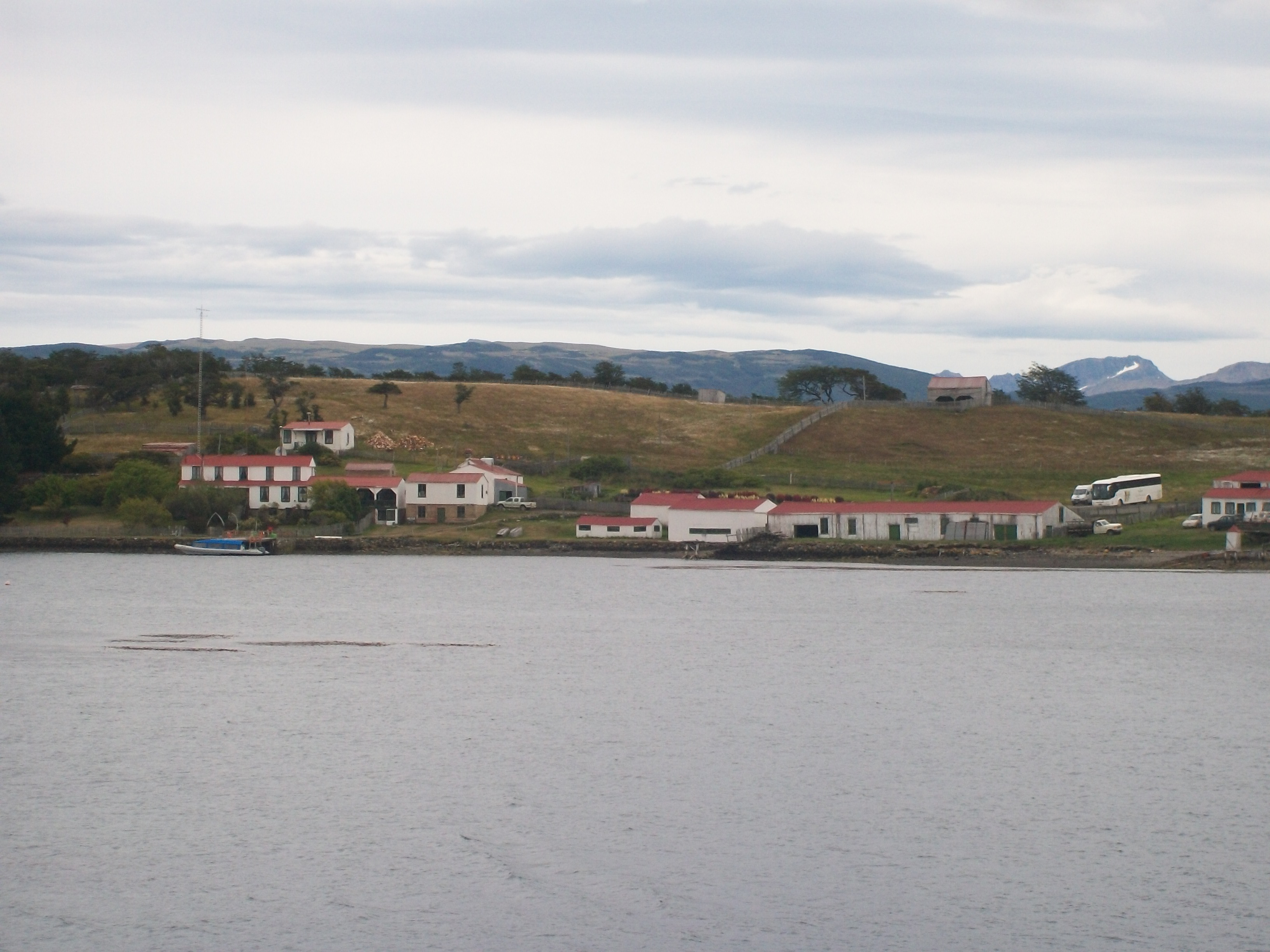 Casco de la estancia Harberton. Tierra del Fuego, Argentina